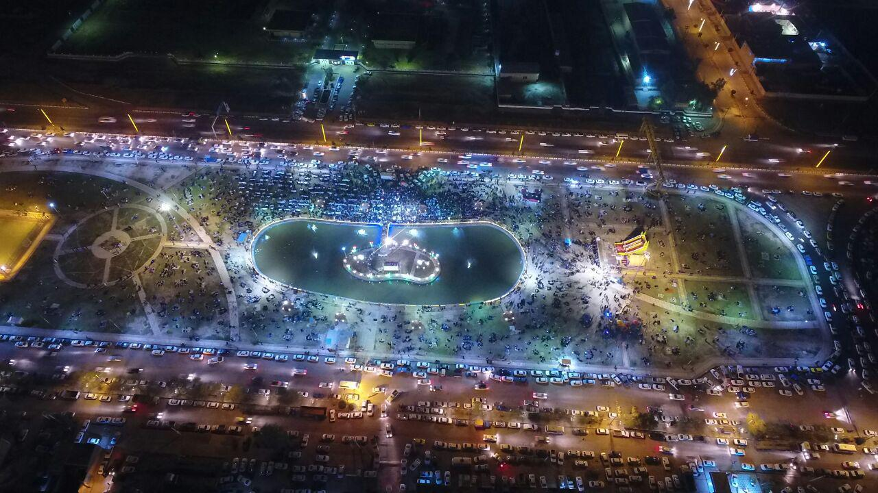 تصویر هوایی ار دریاچه ی مصنوعی شبیشه